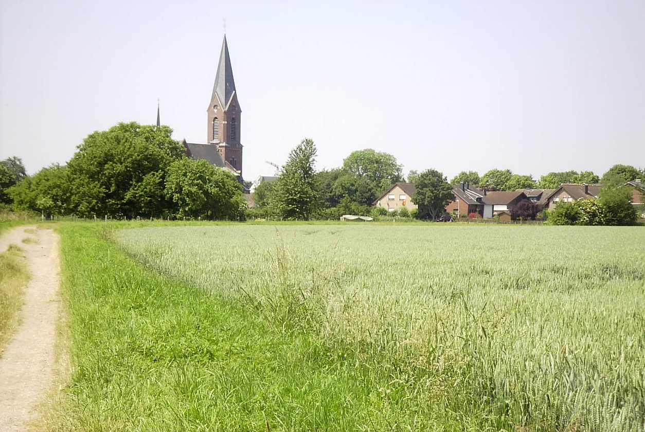 Summary Bildbeschreibung: Hilfarth. Quelle: eigenes Foto Fotograf/Zeichner: bodoklecksel 14:52, 18. Jun 2006 (CEST) Datum: Juni 2006... Sonstiges: ...